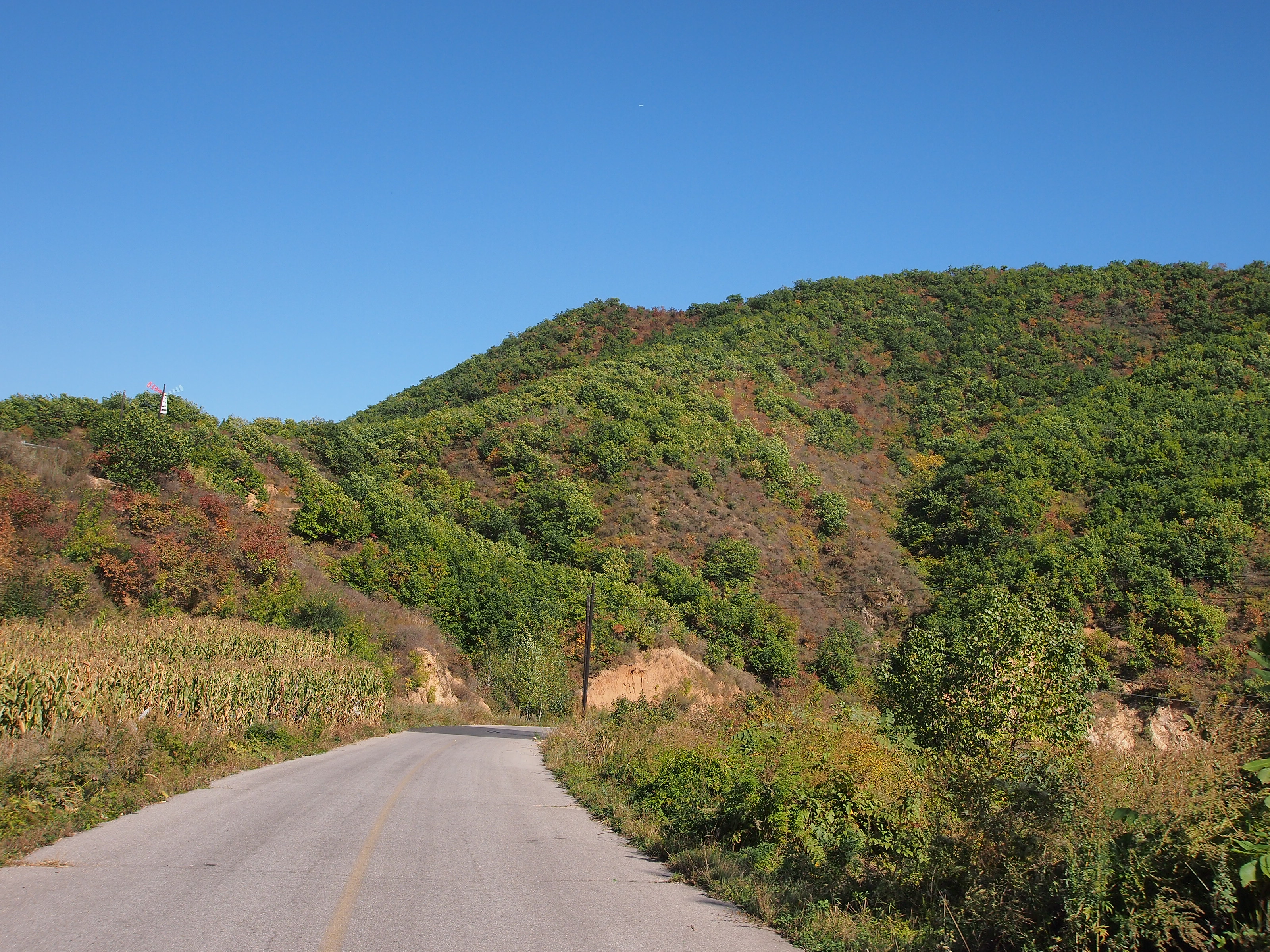 彩林沿路 - Colorful Trees - 2012.10